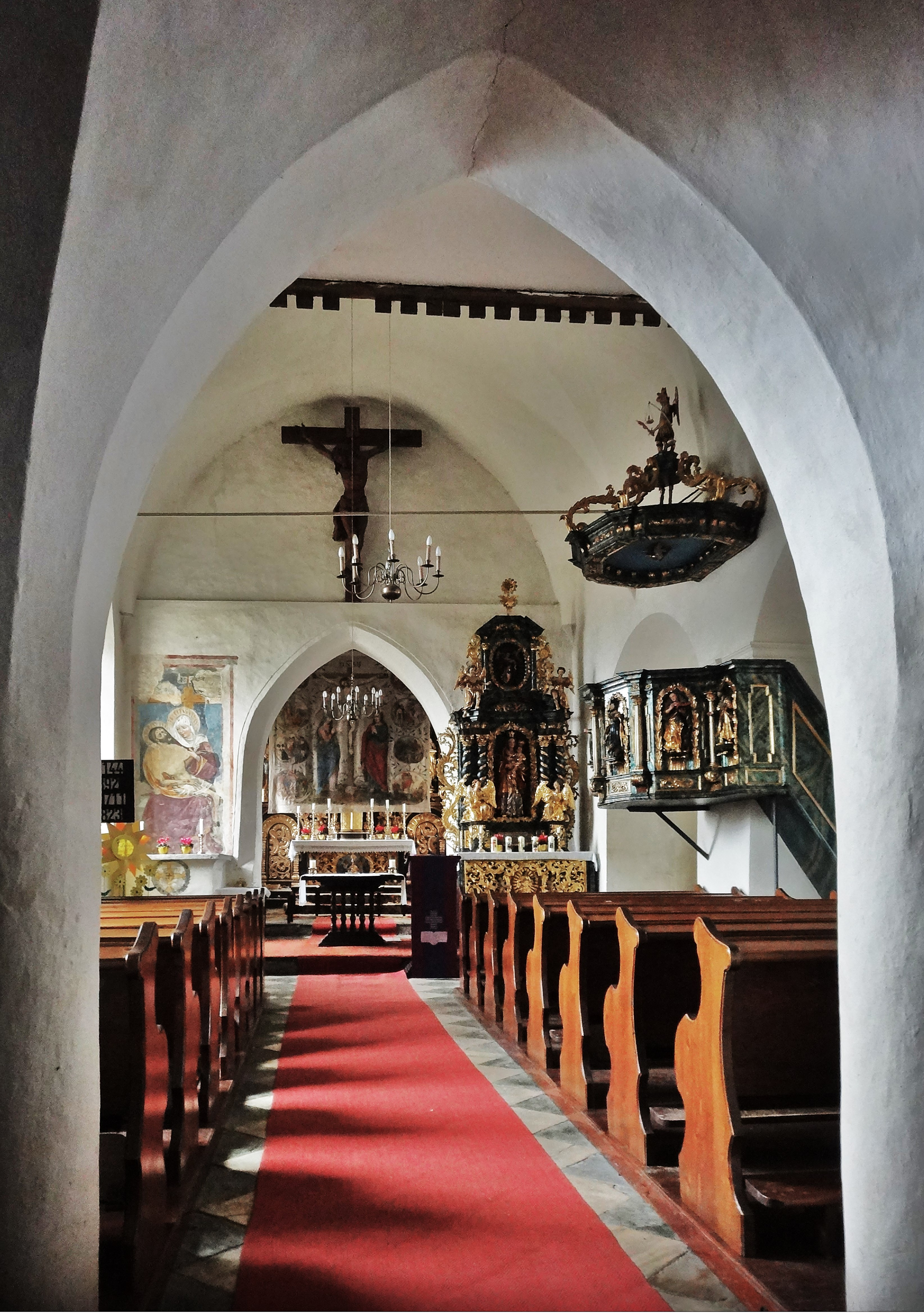 Kath. Pfarrkirche St. Stefan am Krappfeld (Mölbling), Innenansicht